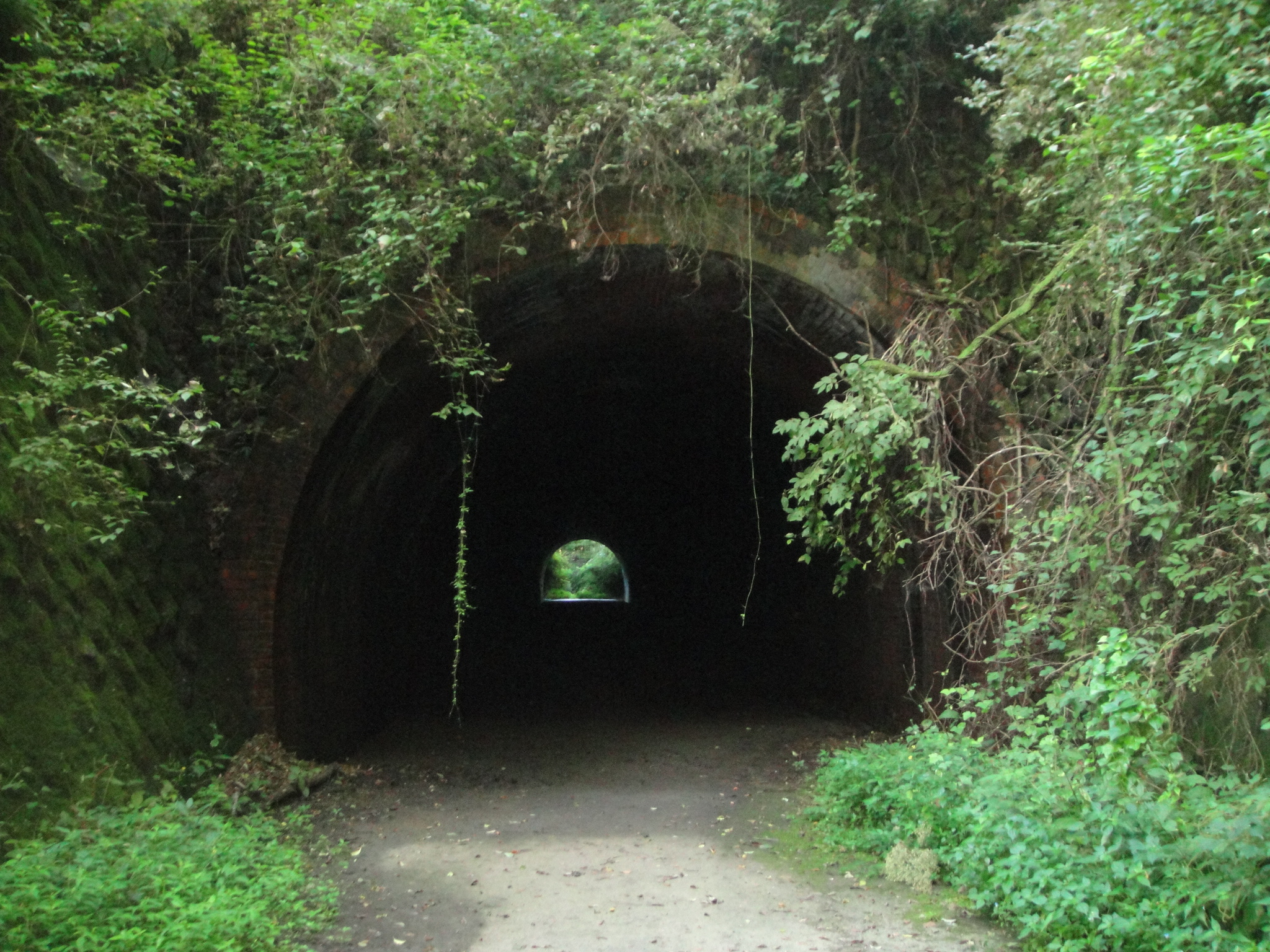 畑トンネル